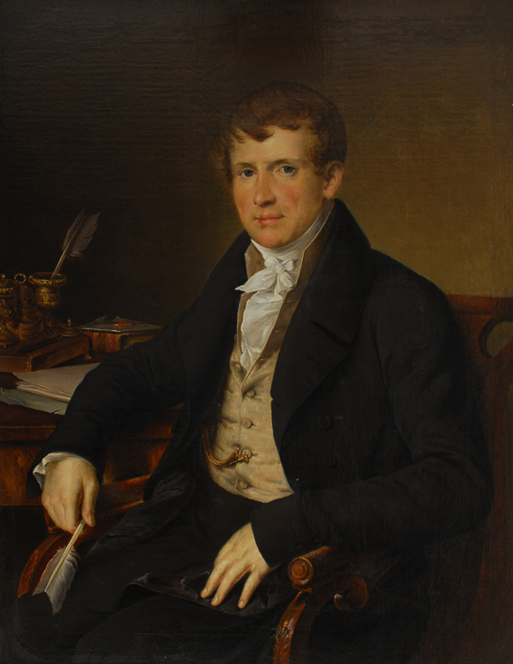 Киселев Диомид Васильевич (1820-e). Худ. В. Тропинин. Холст, масло. 89х71. Инв. № 463-ж, Рязанский музей Д.В. Киселев (1788-1831). Шуйский и московский купец. Сын миллионера, купца 1-й гильдии В.М. Киселева (1766-1831), торговца бумажной пряжей, бывшего до 1779 года крепостным Новосильцевых. Вел торговлю с Англией, распределял сырье и снамбжал им русских фабрикантов. Киселевы имели библиотеку, собрание икон и старопечатных книг, были известны благотворительностью. Ими были построены мост, храм и казармы в Шуе. В.А. Тропинин писал портреты всех членов семьи Киселевых.